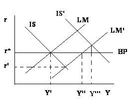 Politica monetaria nell'ISLM con cambi flessibili e PMK